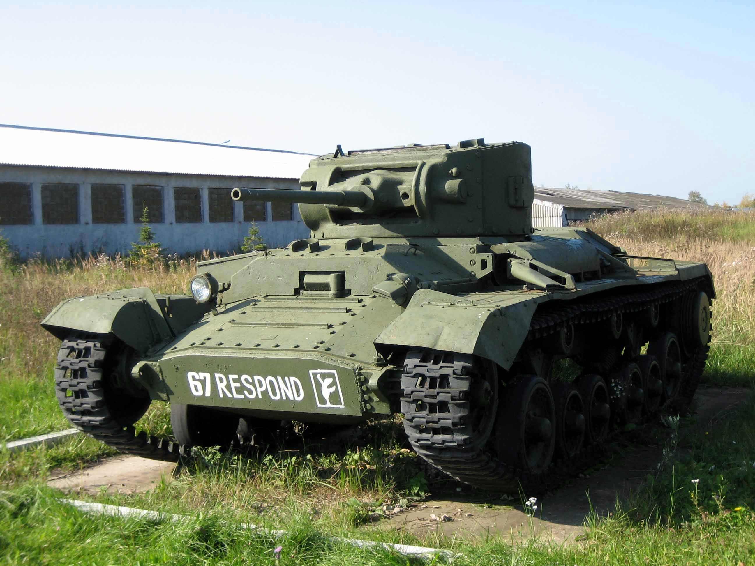 Infantry tank Valentine II in Kubinka tank museum, Russia.